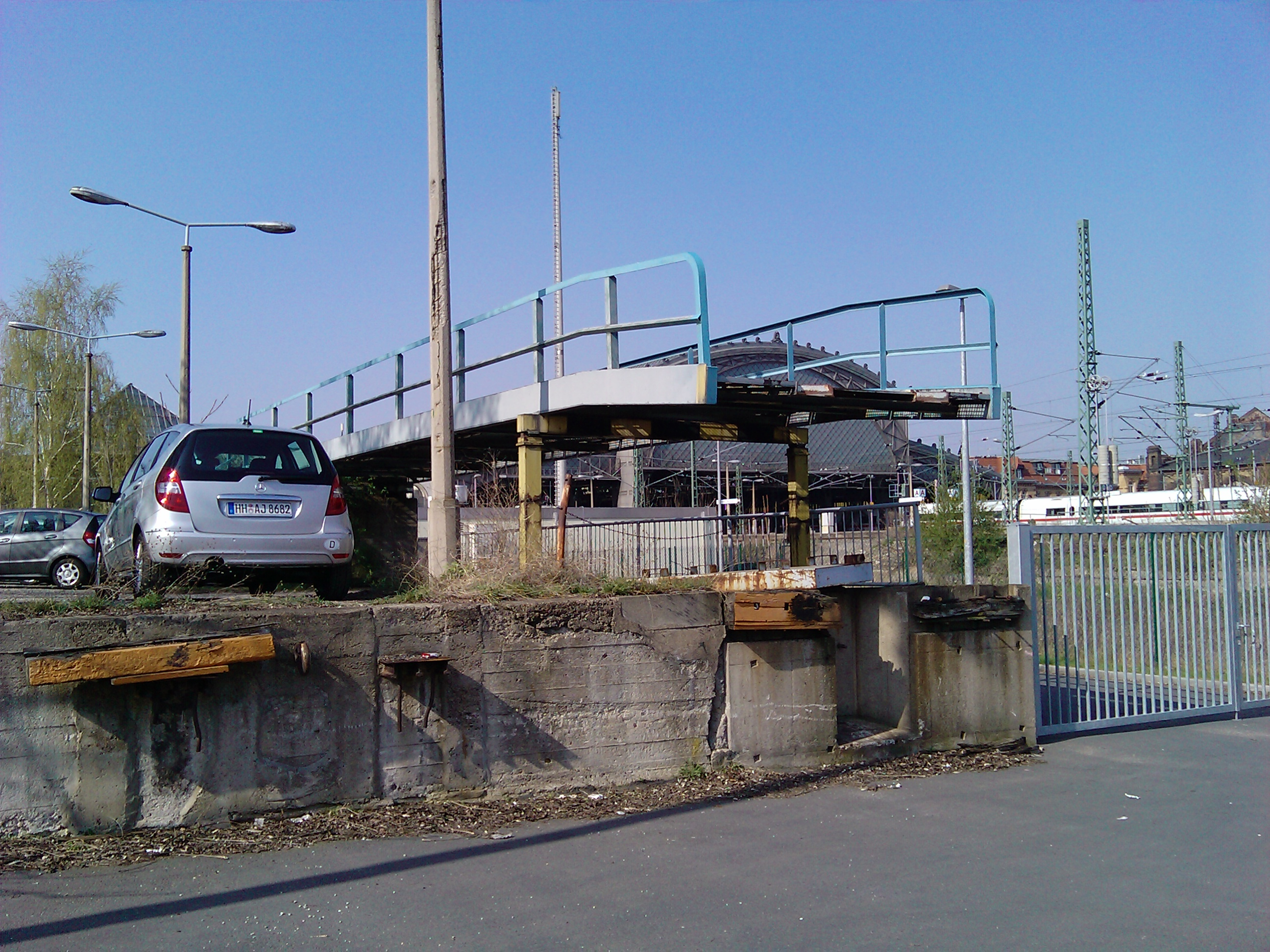 Ehemalige Autoverladung am Bahnhof Dresden-Neustadt